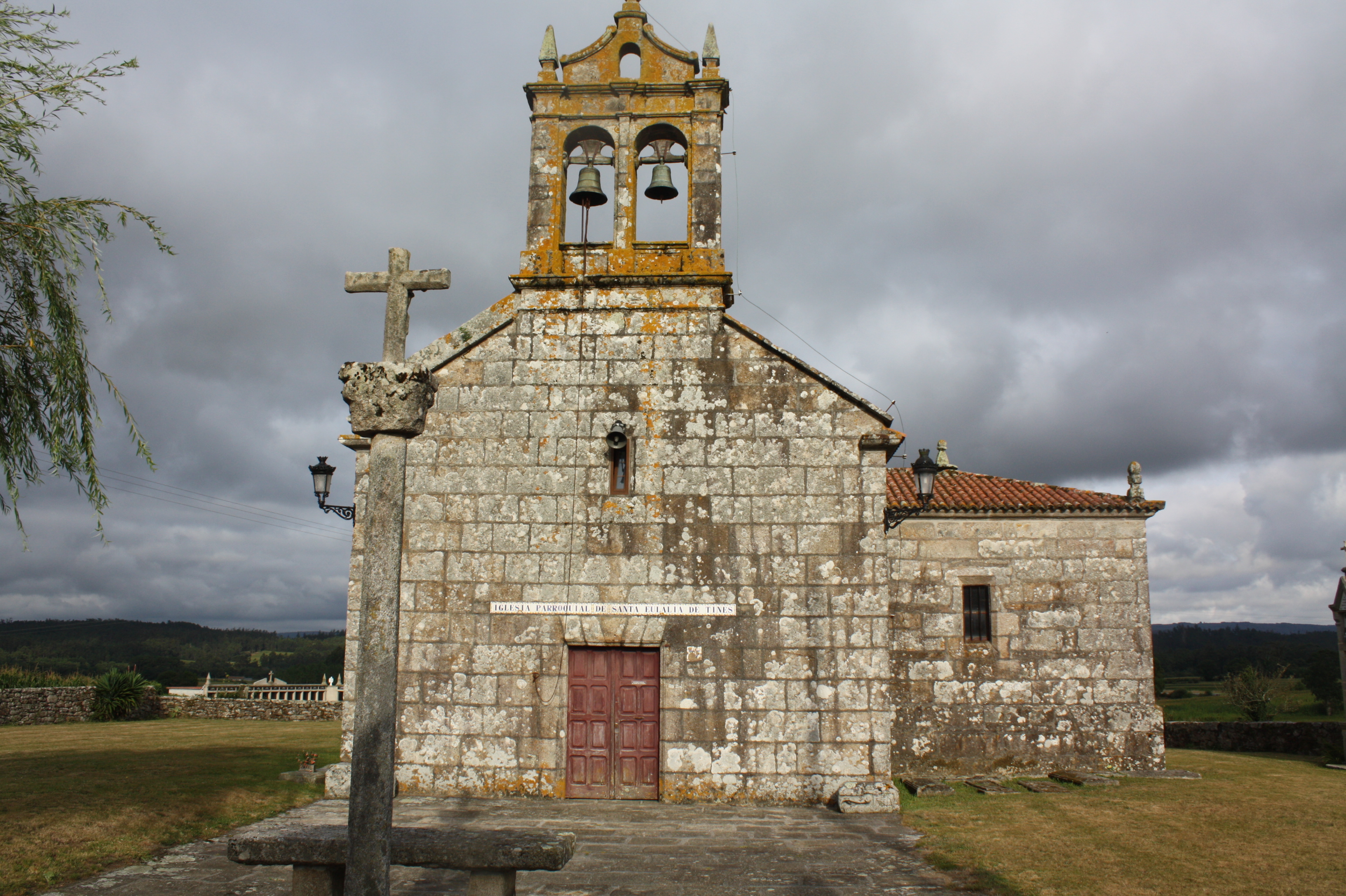 Igrexa de Santa Baia de Tines, do concello de Vimianzo (A Coruña)